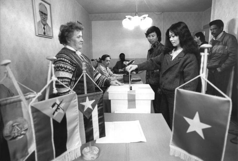 Chemnitz, Gastarbeiter bei der Kommunalwahl ADN-ZB Thieme 7.5.89 Karl-Marx-Stadt: Wahl- Im Wahllokal Wolgograder Allee in Karl-Marx-Stadt machten vietnamesische, kubanische und mocambiquische Werktätige von ihrem Wahlrecht Gebrauch. Vorn: Vo Thi Kim, die als Güterkontrolleur im VEB Barkaswerke Kalr-Marx-Stadt arbeitet.